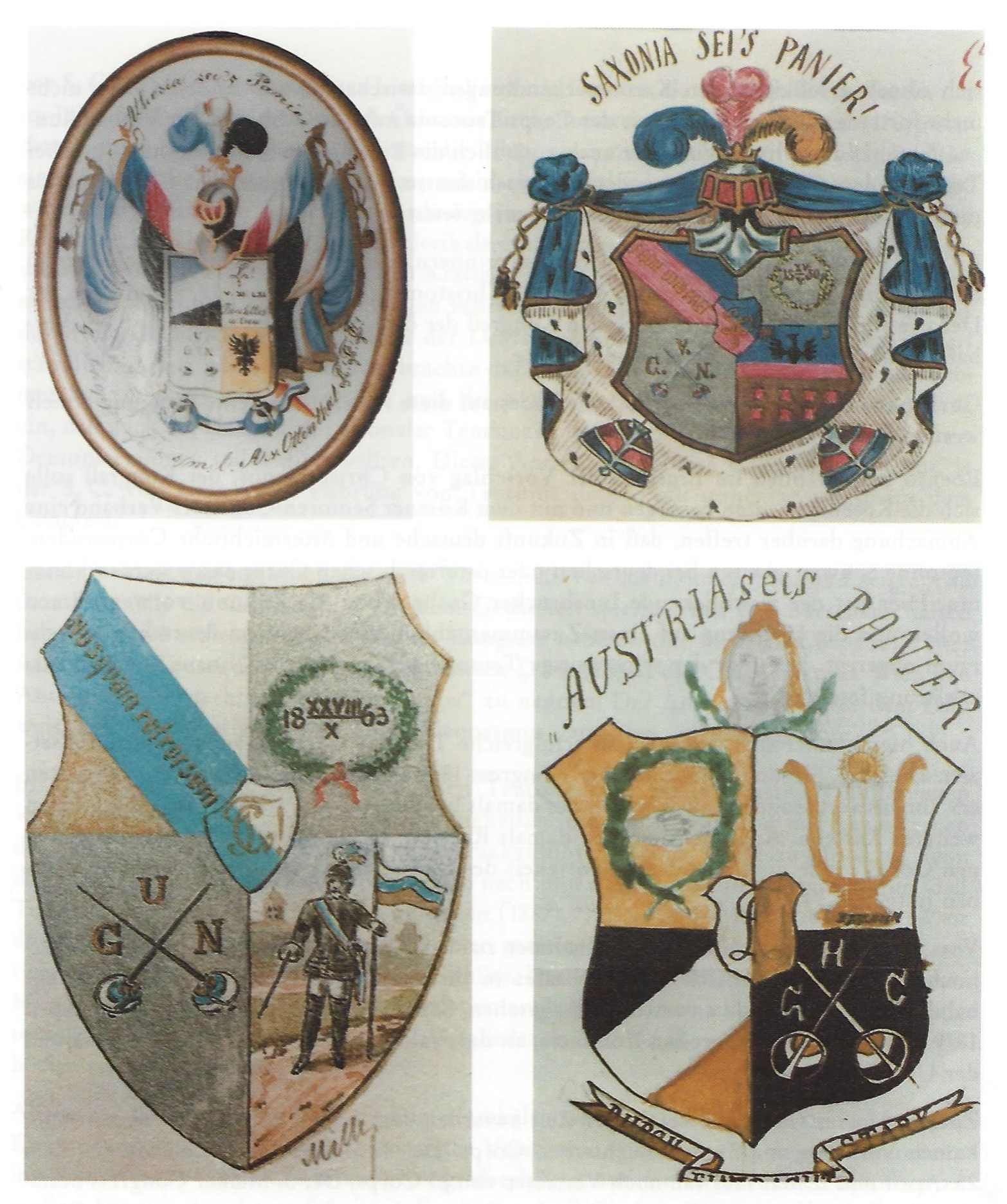 Die Studentenwappen der vier Corps im (österreichischen) Blauen Kartell: Athesia Innsbruck, Saxonia Wien, Teutonia Graz, Austria Prag.